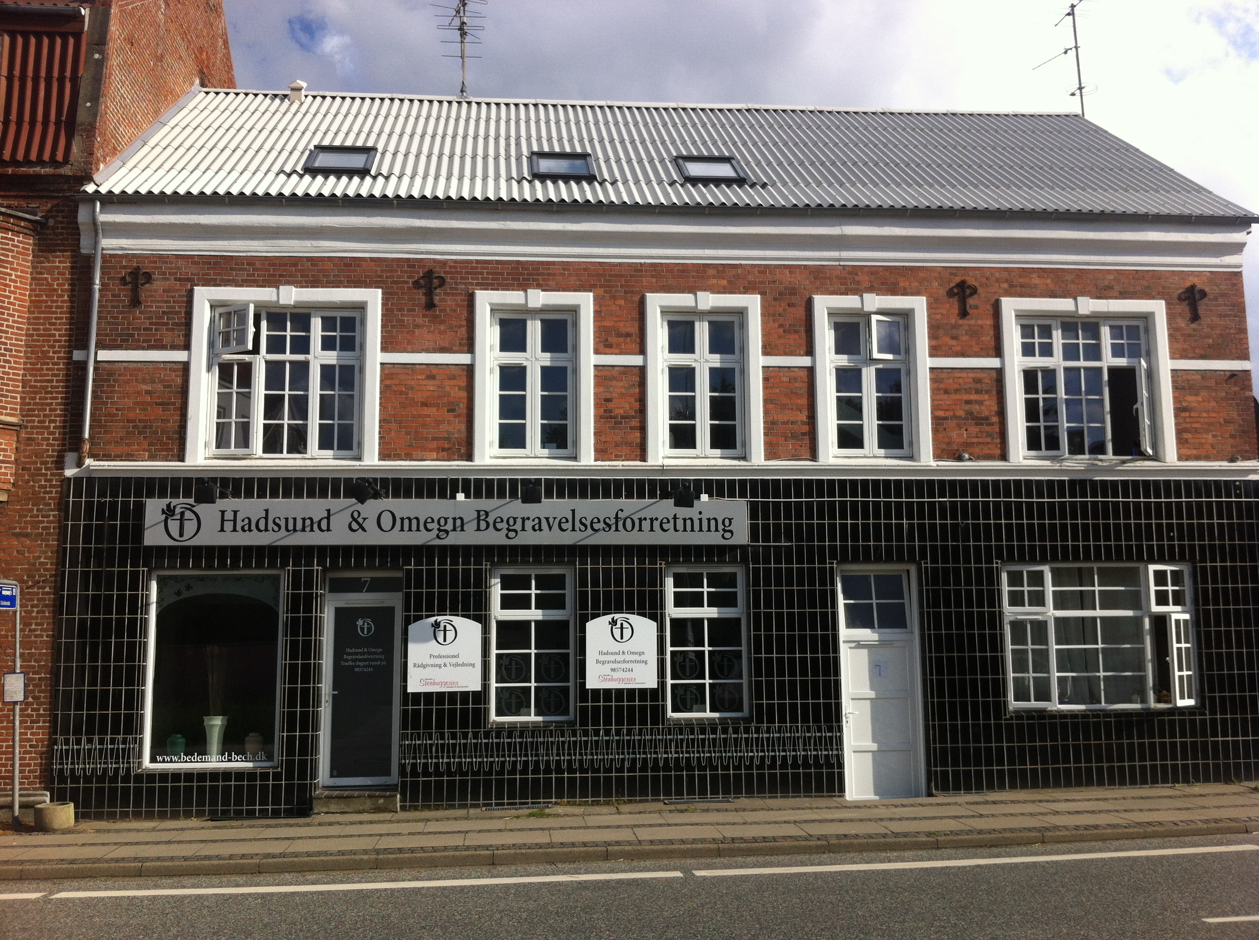 Vestergade, 9560 Hadsund.